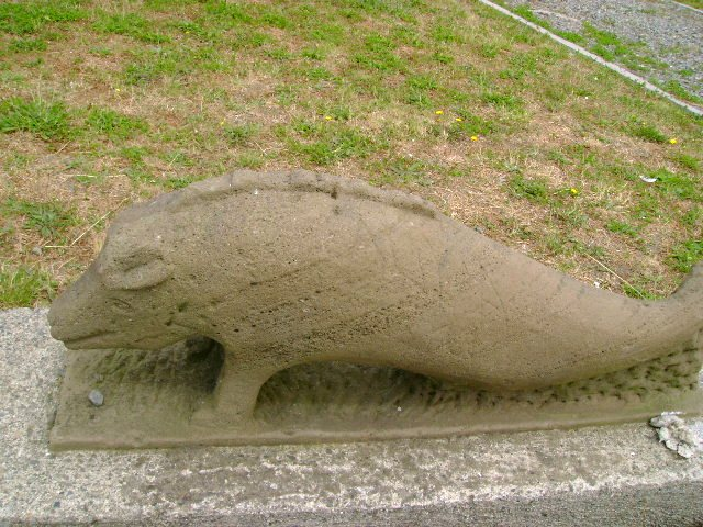 Representación en cancagua de un cuchivilo, ser de la mitología de Chiloé, Chile.